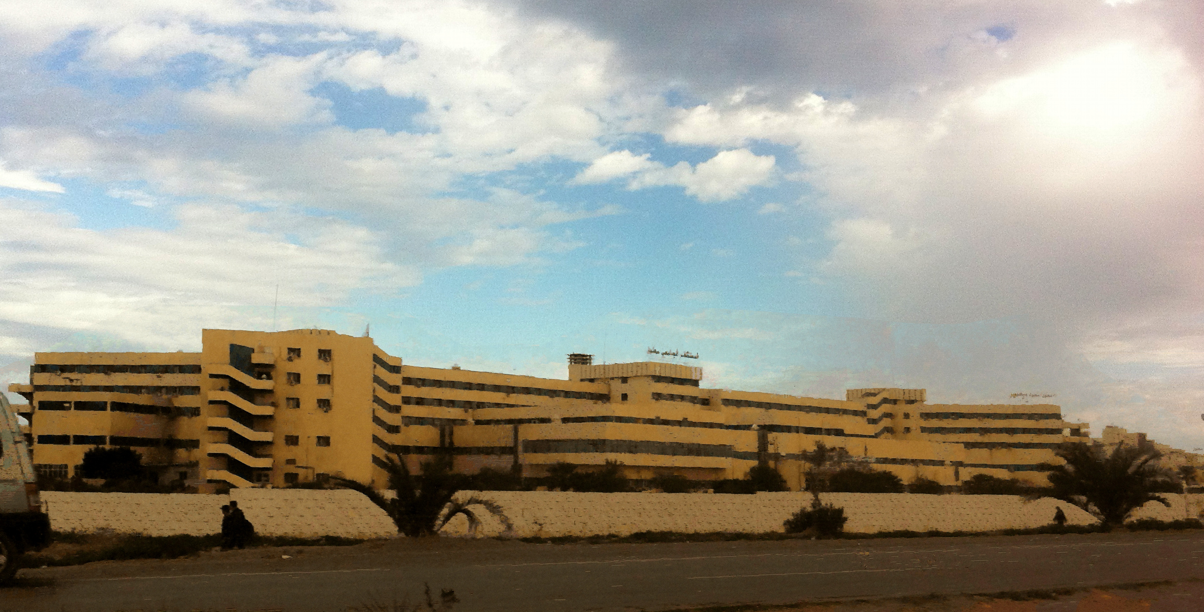 Photo du CHU Sahloul de Sousse, Tunisie